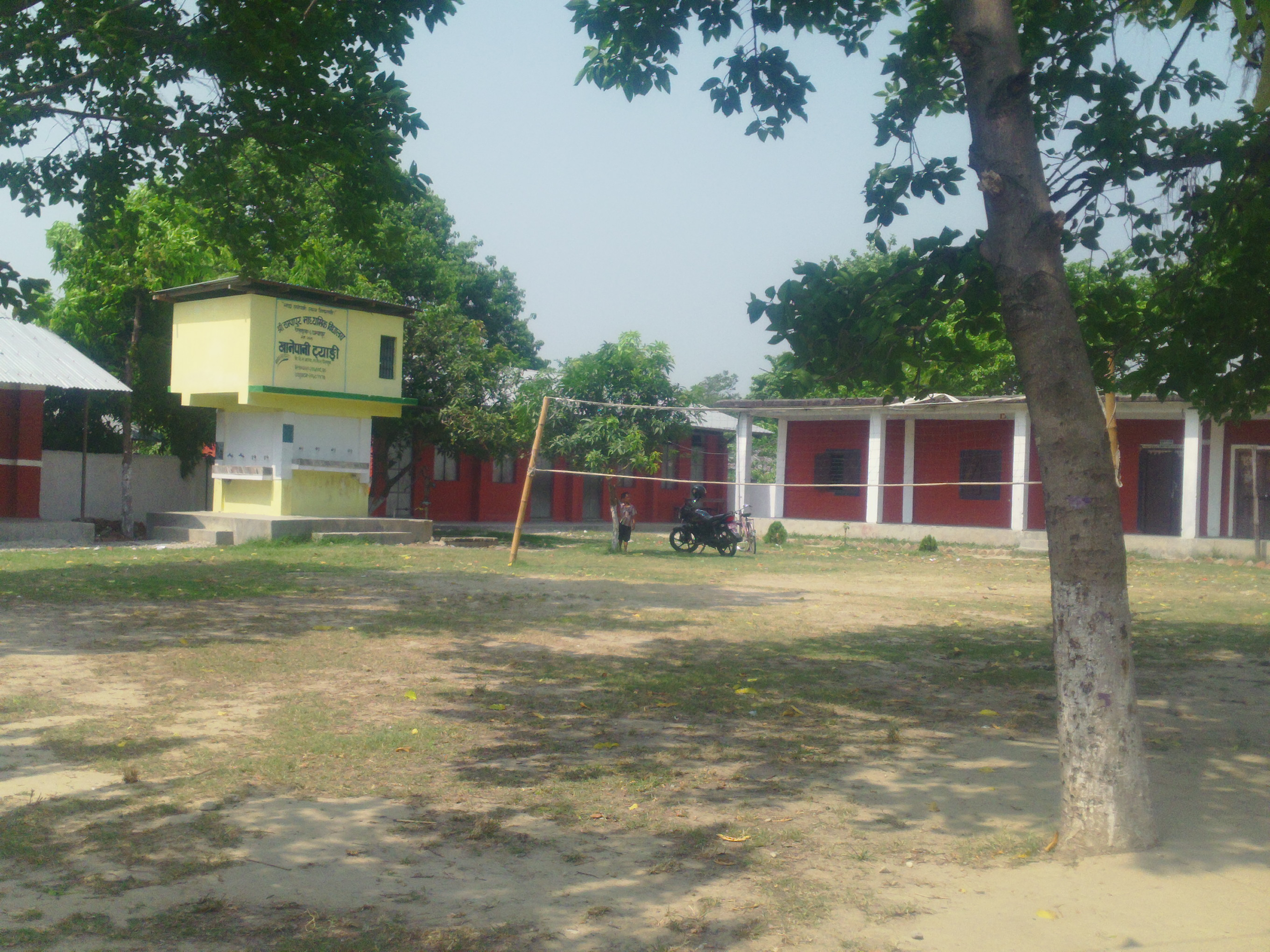 नेपाली: पानी ट्याँङ्की